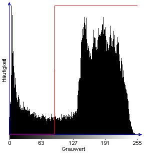 Histogramm des Bildes Herz mit Pfeil.png mit Transformationkennlinie für Anwendung des Schwellwertes 90